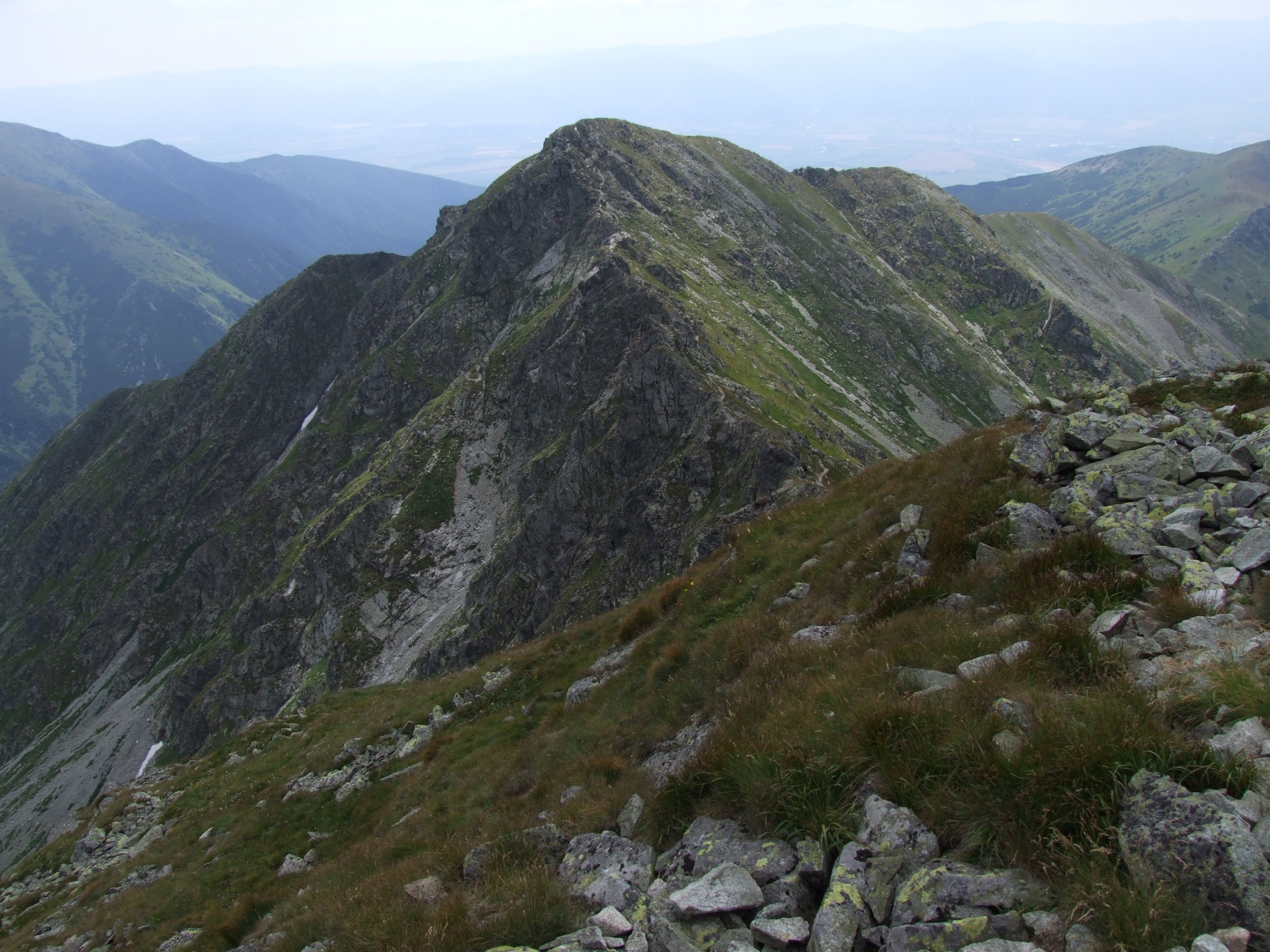 jałowiecki Przysłop (Jalovecky príslop) - West Tatra Mountains